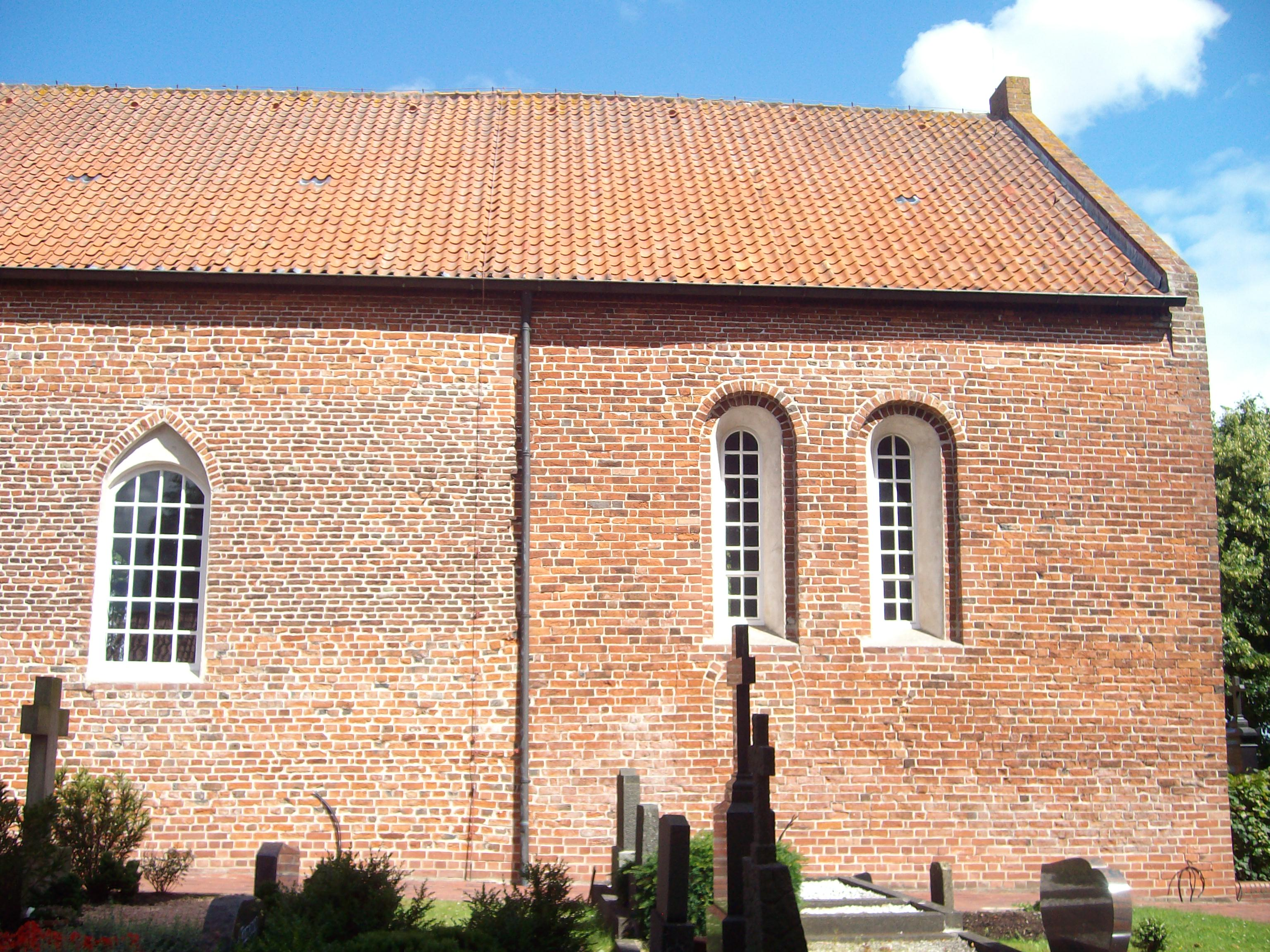 Südseite der Kirche in Holtgaste, Ostfriesland